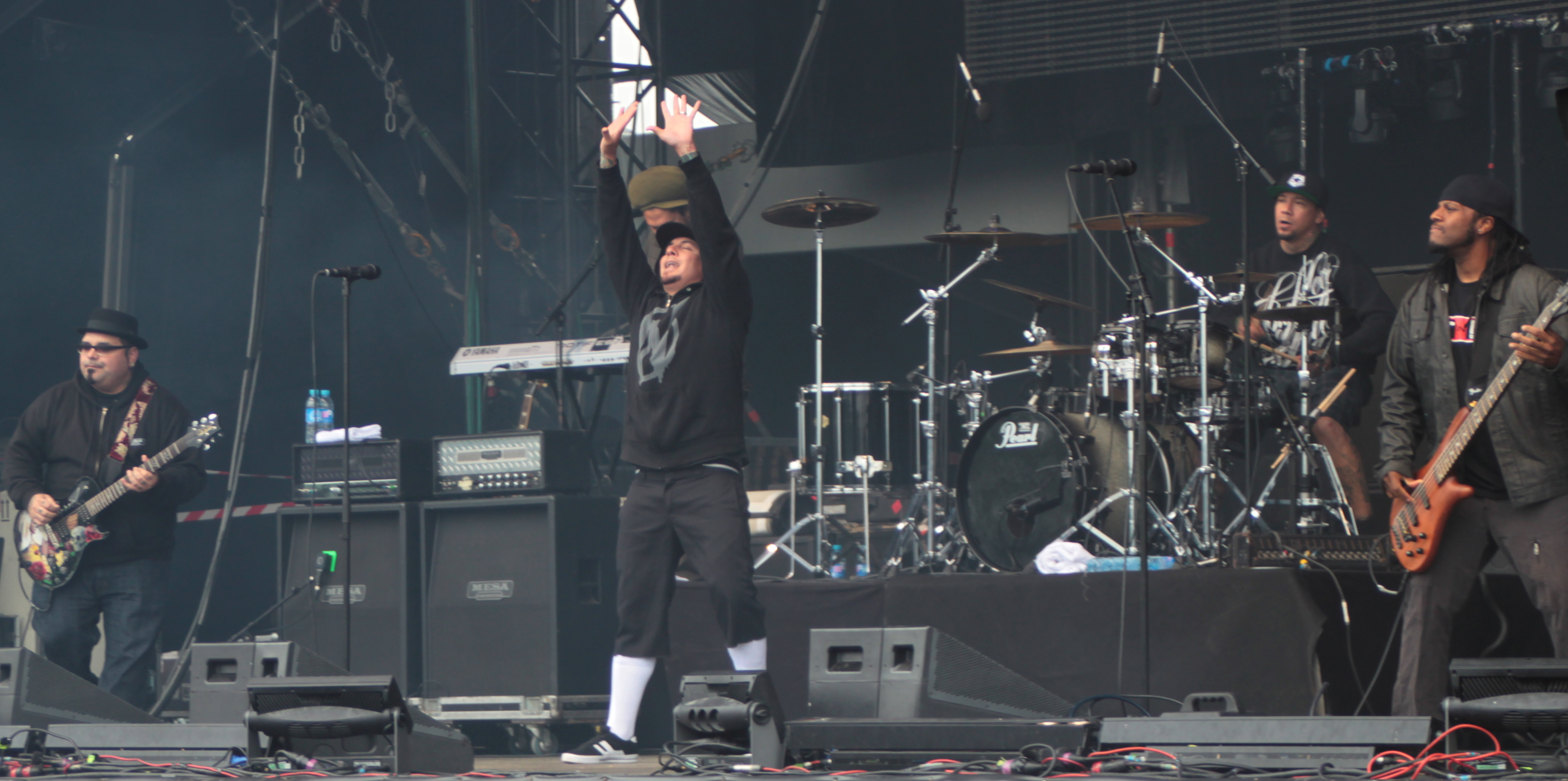 P.O.D., Hellfest 2013, Fr-44-Clisson.